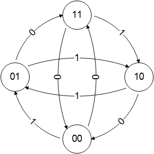 Граф поясняющий код Миллера